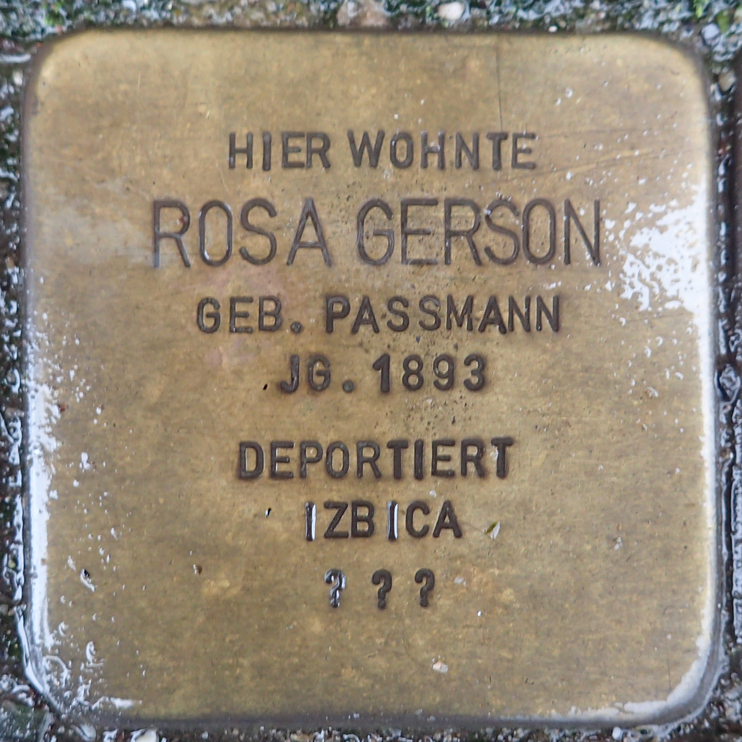 Stolperstein Geldern Bahnhofstraße 36 Rosa Gerson